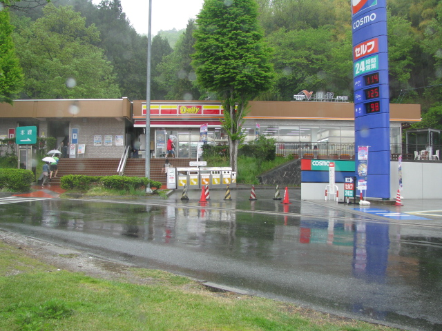 2009年5月5日、中央道上り阿智PA付近で撮影